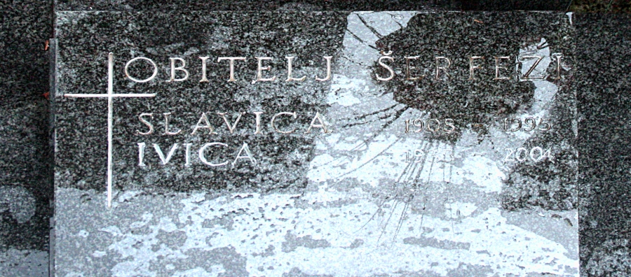 Grob Ivice Šerfezija na Mirogoju u Zagrebu